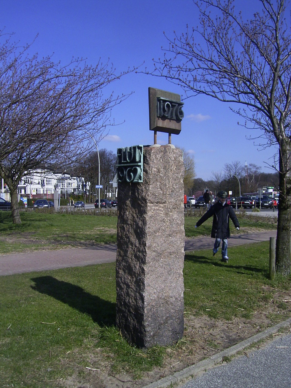 Gedenkstein in Nienstedten in der Nähe des Anlegers Teufelsbrück zum Gedenken an die Sturmfluten 1962 und 1976. Die Markierung stellt jeweils den höchsten Stand der Flut im entsprechenden Jahr dar.